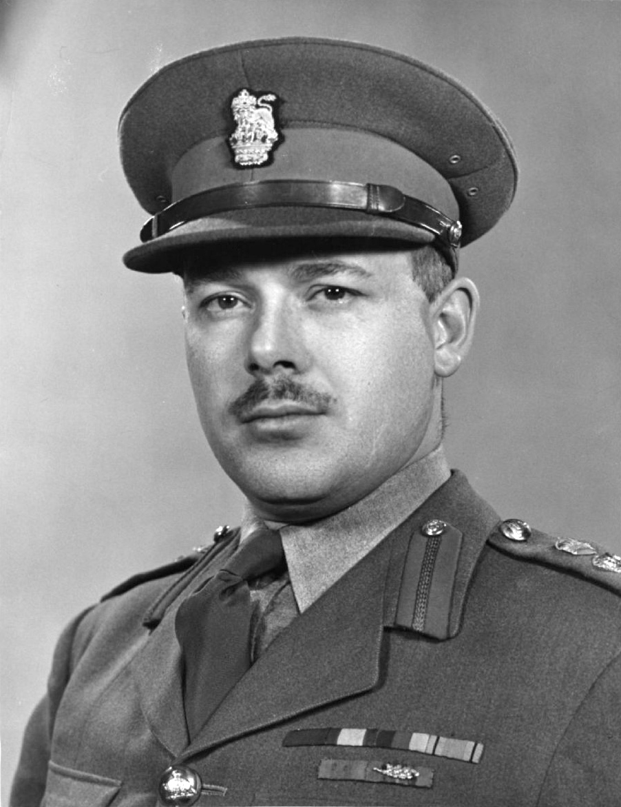 Dollard Ménard (1913-1997)